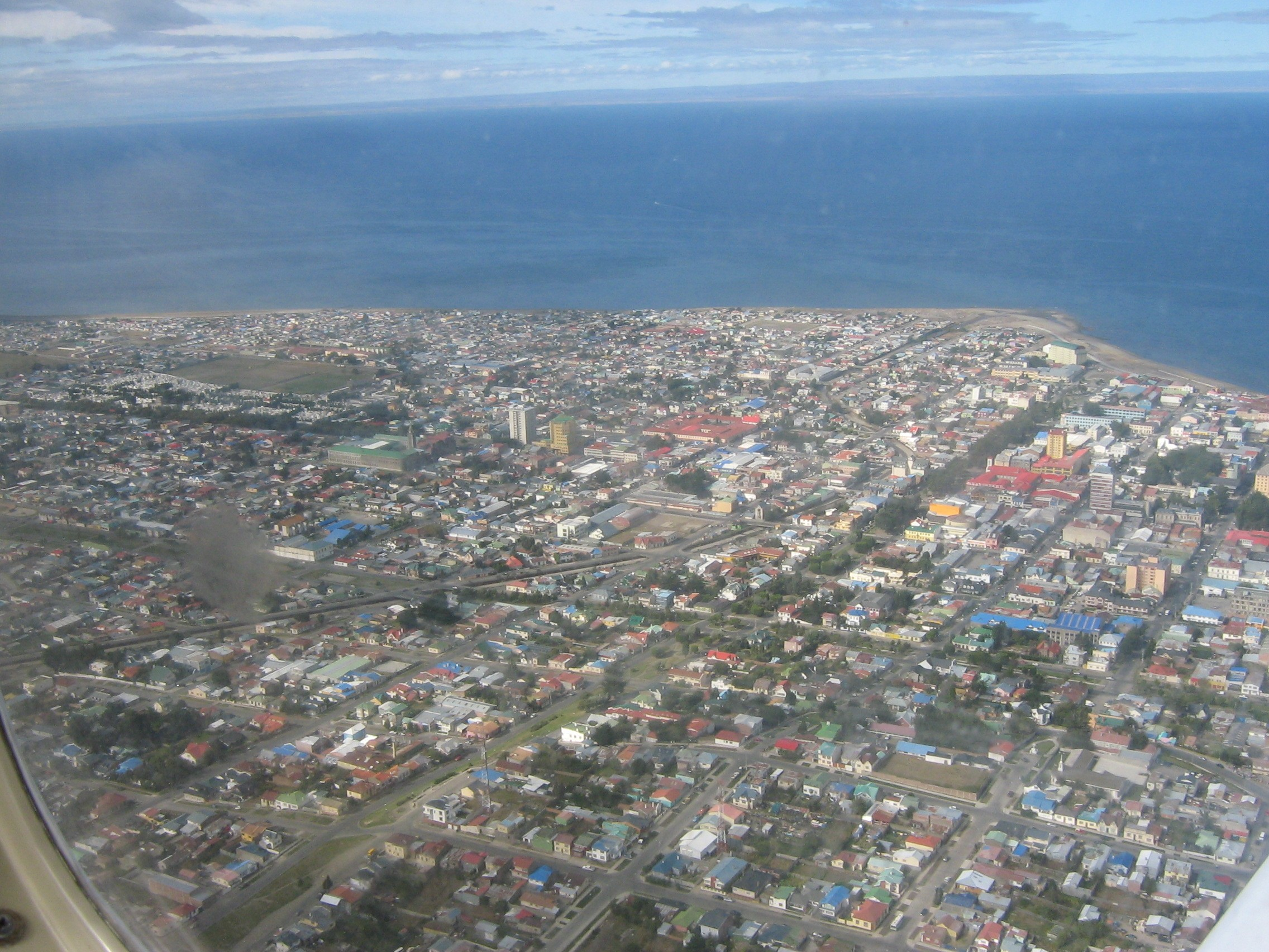 Punta Arenas bird view